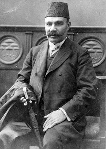 Ağabala Quliyev